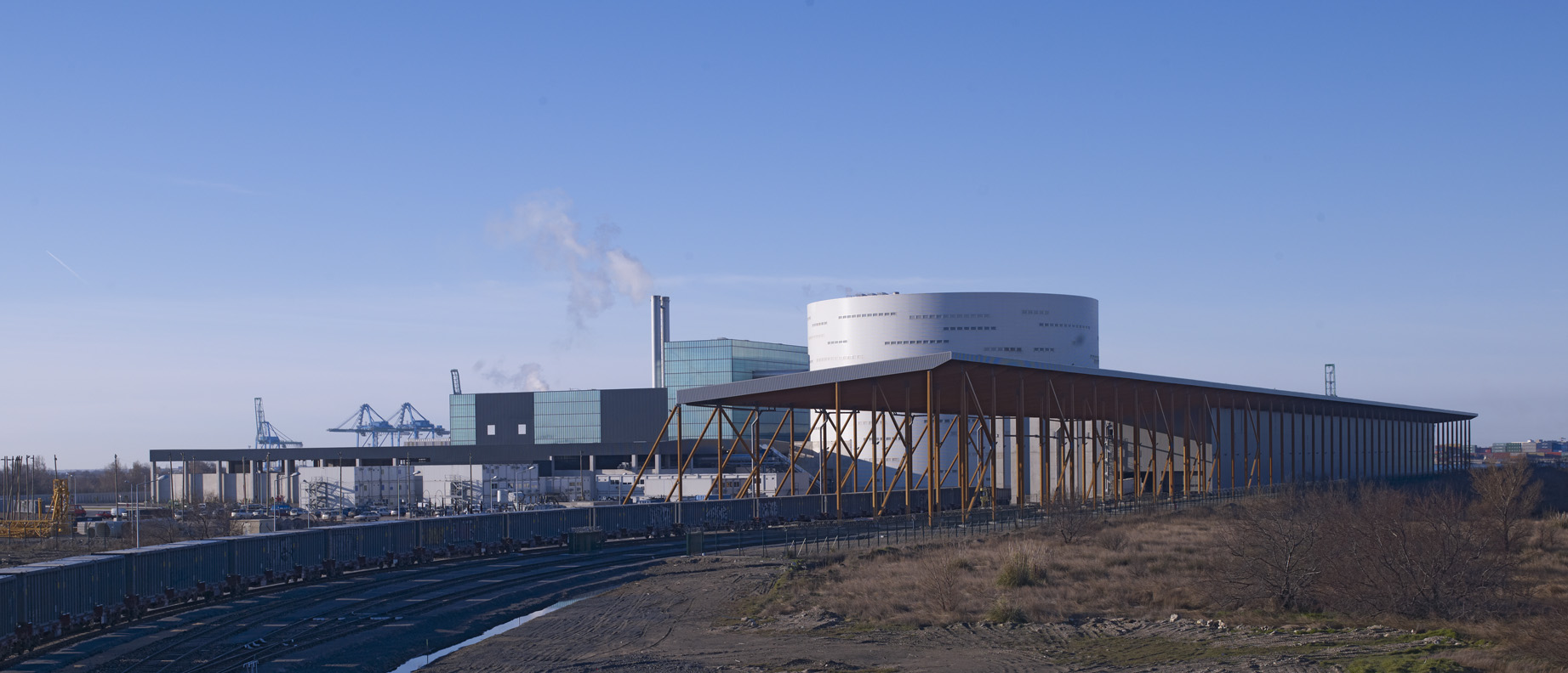 EveRé site de traitement multifilière des déchets ménagers